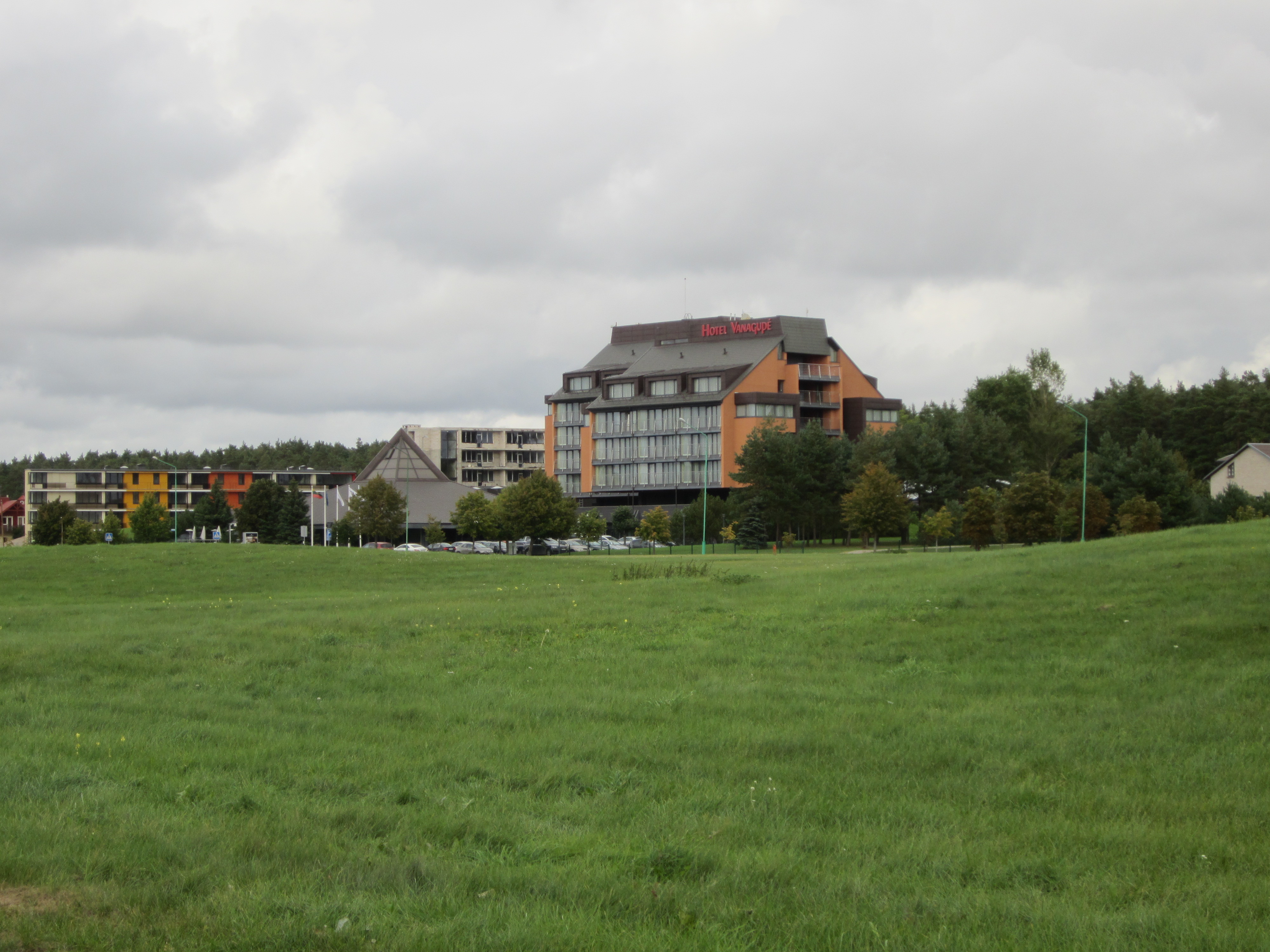 Vanagupė, Palanga